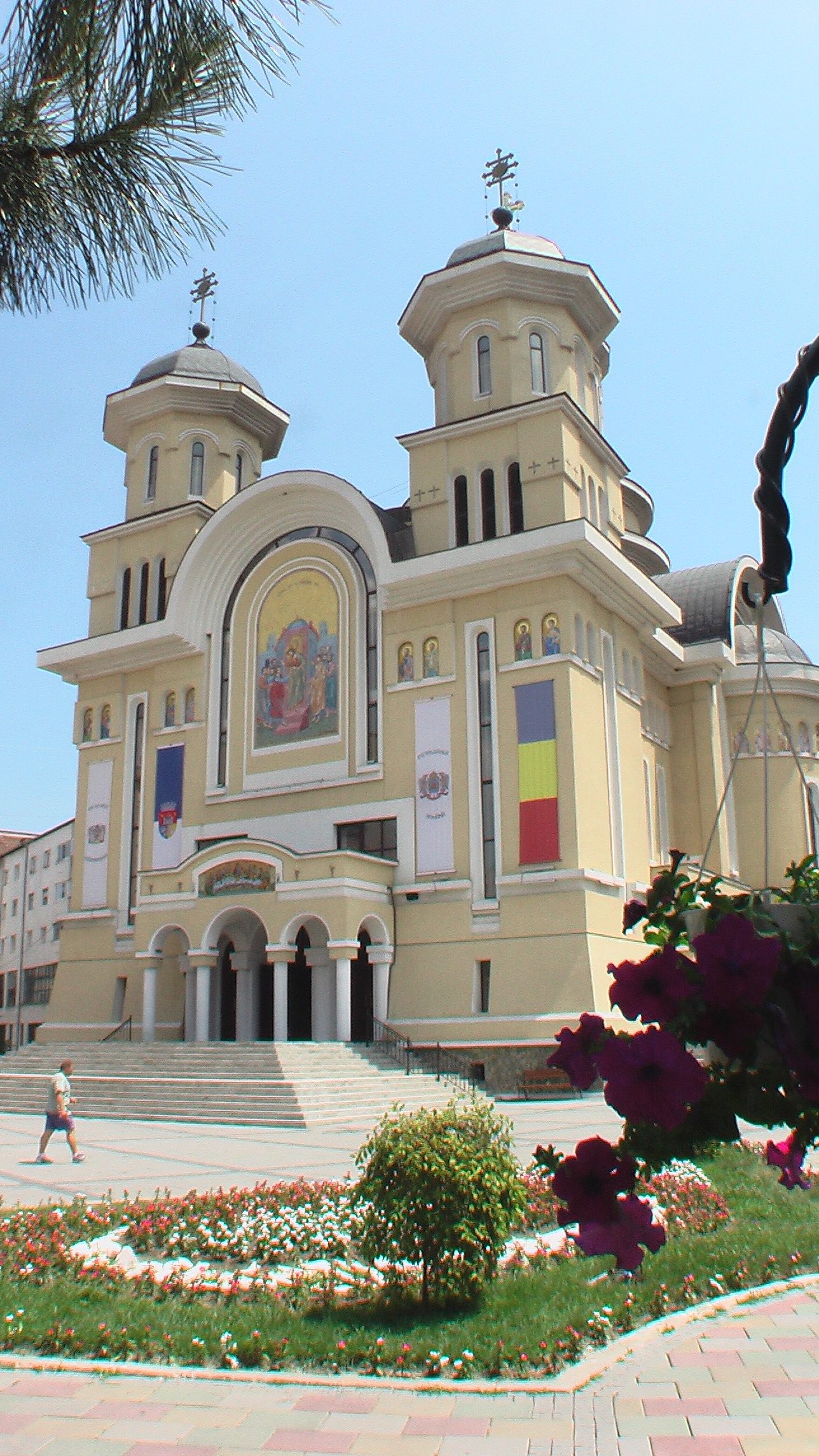 CaransebesKathedraleStGheorghe1